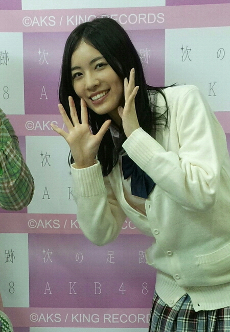 (20140503) 次の足跡 샤메회 in 오사카 (Jurina Matsui)